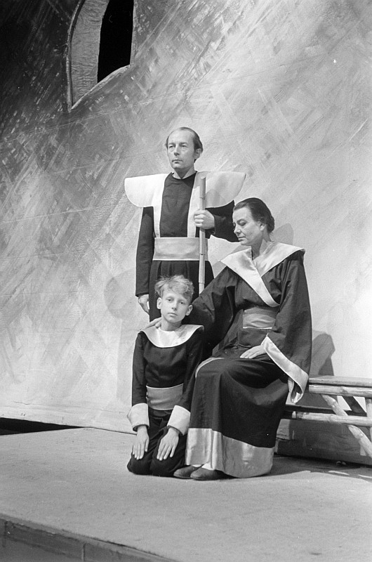 Original image description from the Deutsche Fotothek Szenenbilder